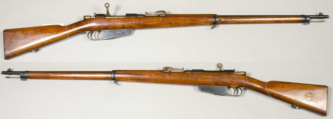 Italijanska repetirka Carcano, model 1891.